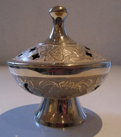 Arabische Räucherschale aus Messing mit Gittereinsatz (nicht zu sehen) und Deckel.